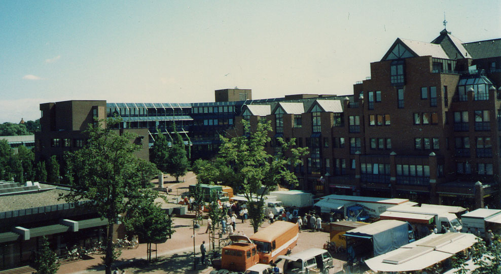 Bildbeschreibung: Stadtzentrum Langenhagen: Marktplatz mit Postgebäude, Rathaus und Haus am Markt. Fotograf/Zeichner: Fischchen Datum: 1989